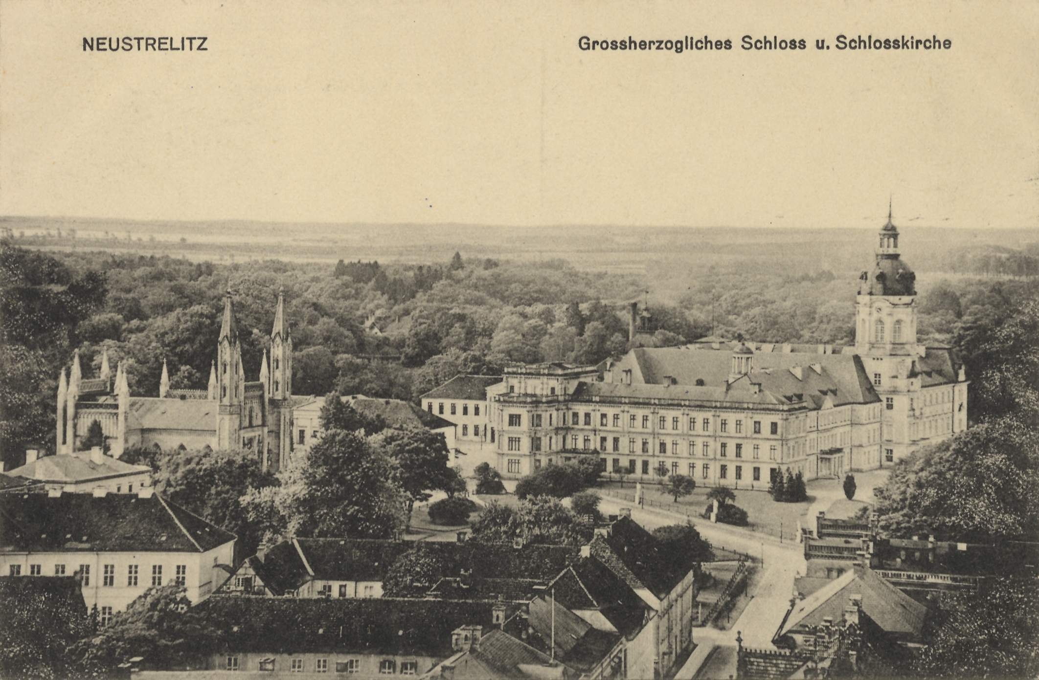 Schloss und Schlosskirche